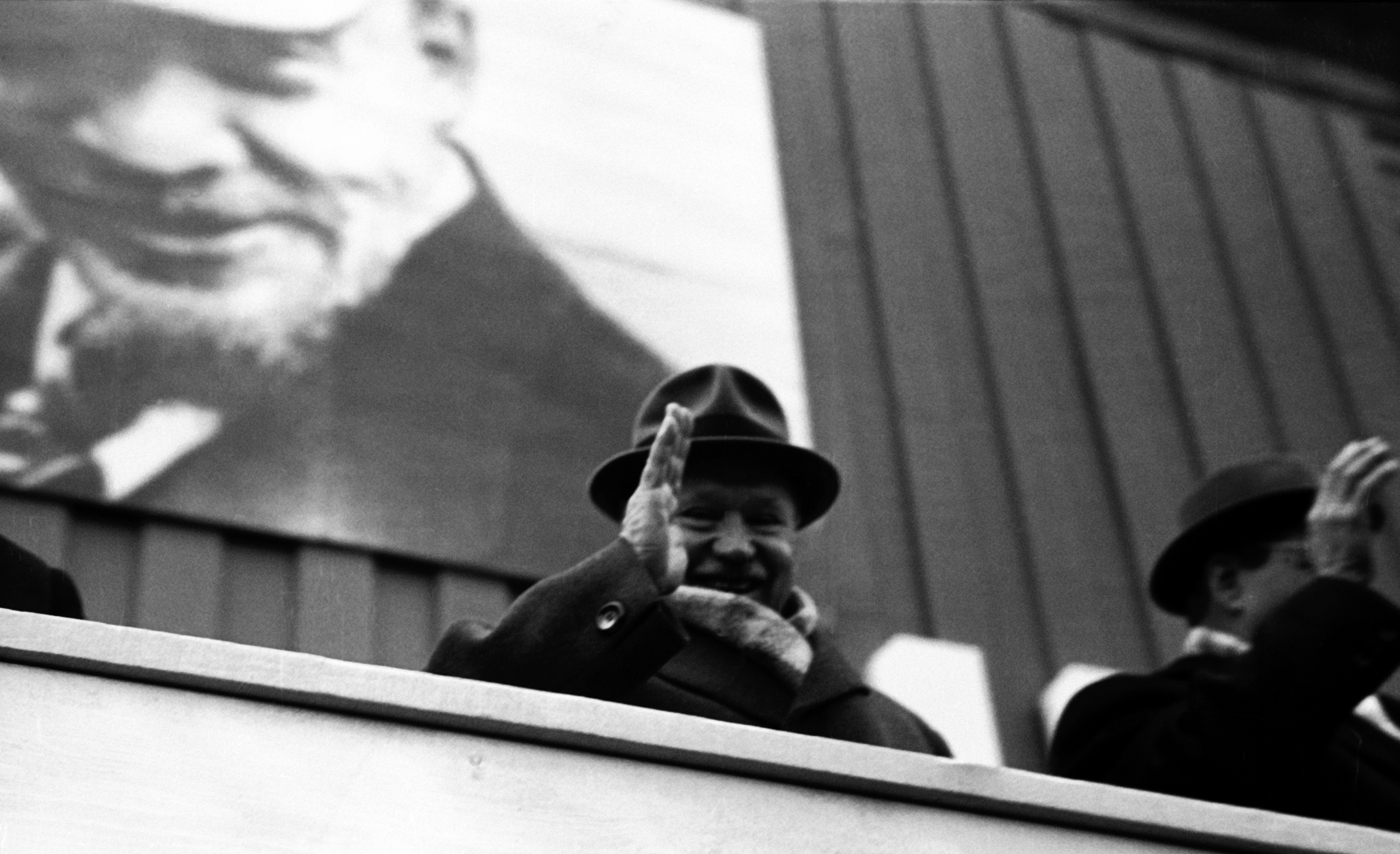 Antanas Sniečkus ve Vilniusu na tribuně při oslavách VŘSR v roce 1970Lietuvių: Antanas Sniečkus Vilniuje 1970-11-07